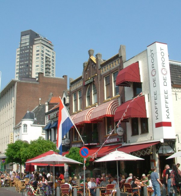 Het Wilhelminaplein in Eindhoven Centrum, in de wijk de Bergen